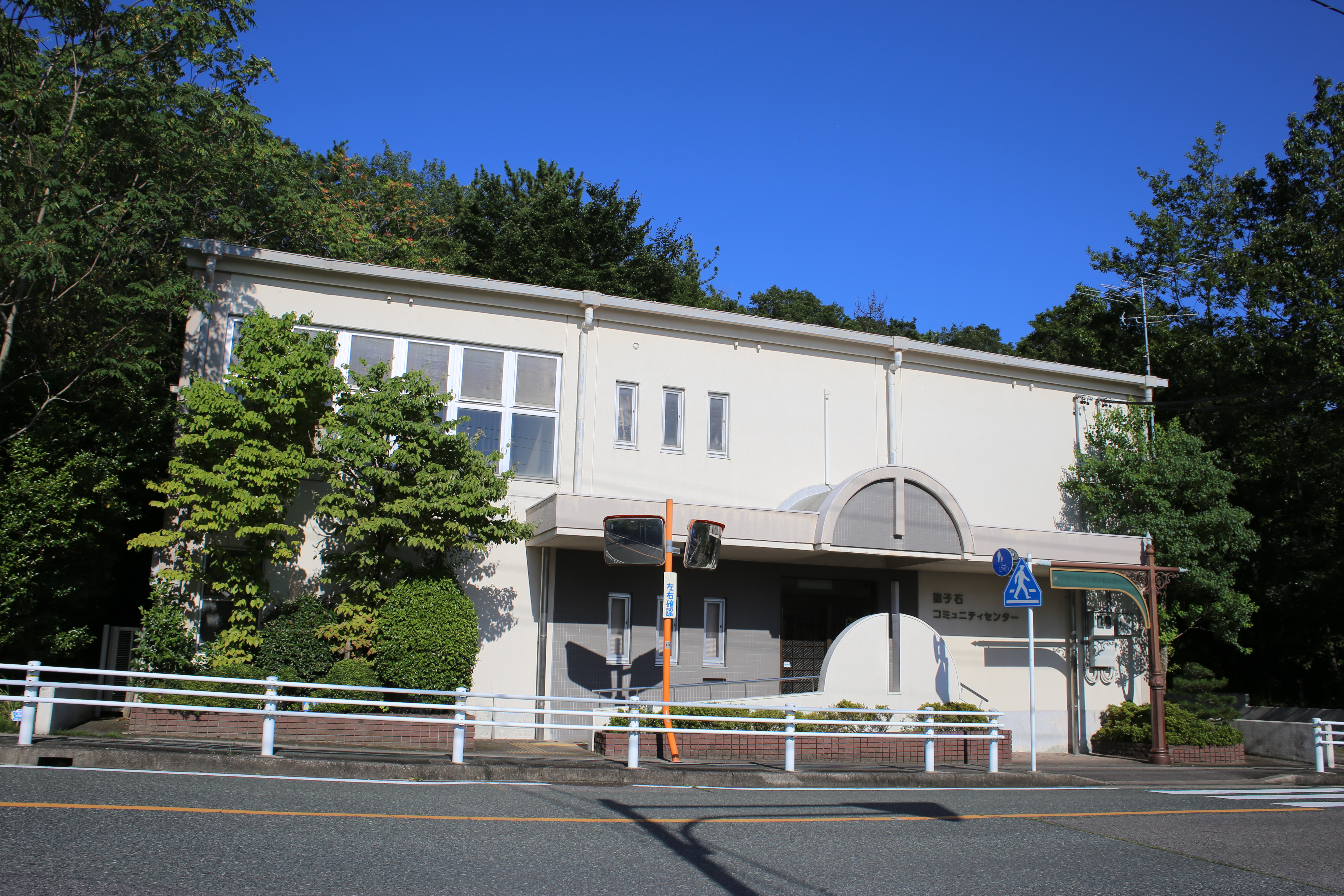 名古屋市名東区の明徳公園内 猪子石コミュニティセンターを西側公道北側より撮影